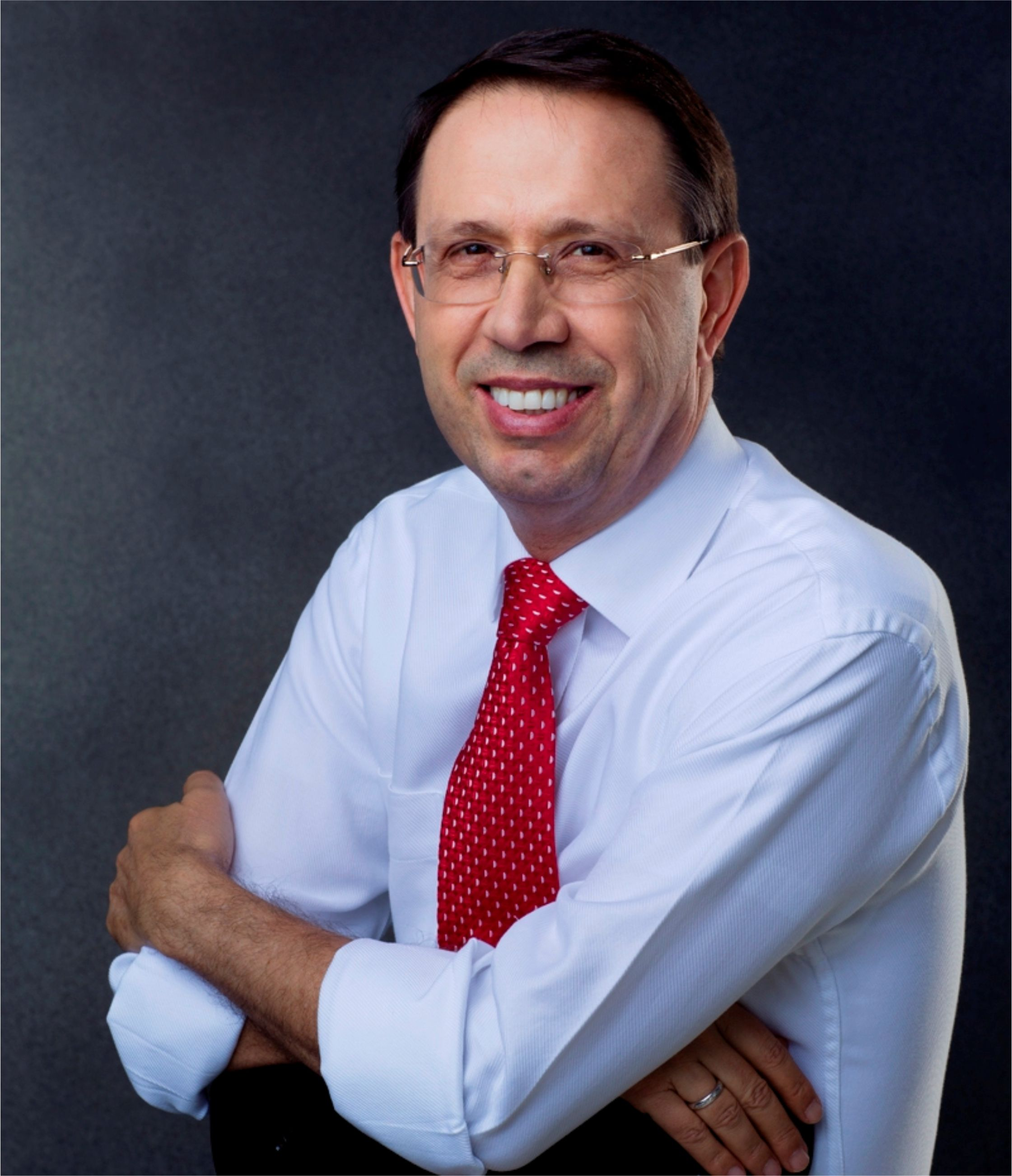 Professor Carlos Wizard Martins